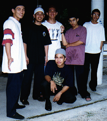 a